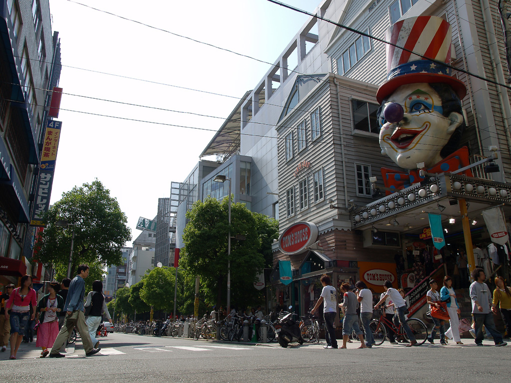 アメリカ村（周防町筋付近）